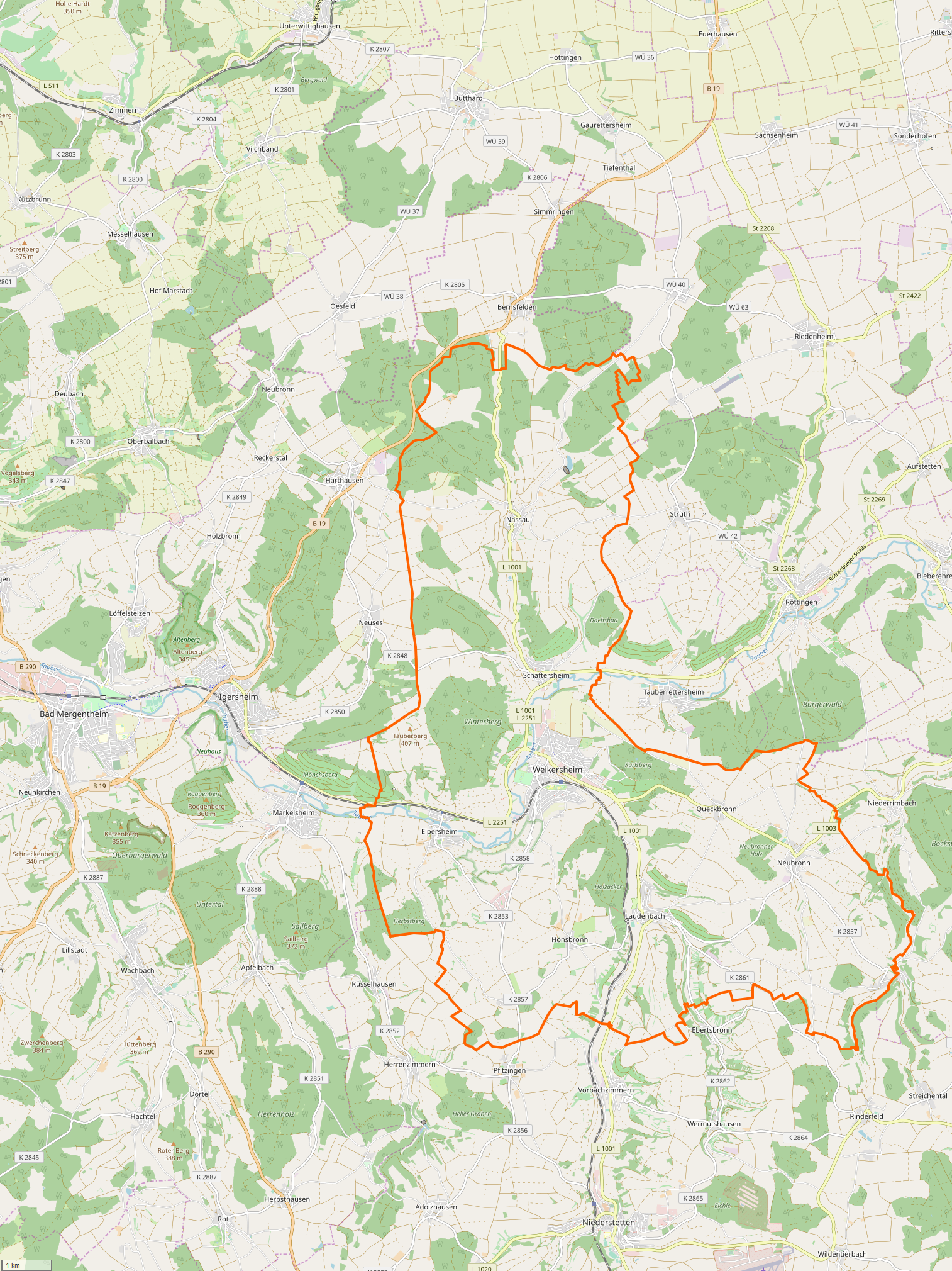 Gemarkung und Lage der Stadt Weikersheim. Siehe auch: Liste der Kulturdenkmale in Weikersheim. Liste der Straßennamen von Weikersheim. Gemarkungen und Lagen der Städte und sonstigen Gemeinden im Main-Tauber-Kreis: Ahorn · Assamstadt · Bad Mergentheim · Boxberg · Creglingen · Freudenberg · Großrinderfeld · Grünsfeld · Igersheim · Königheim · Külsheim · Lauda-Königshofen · Niederstetten · Tauberbischofsheim · Weikersheim · Werbach · Wertheim · Wittighausen